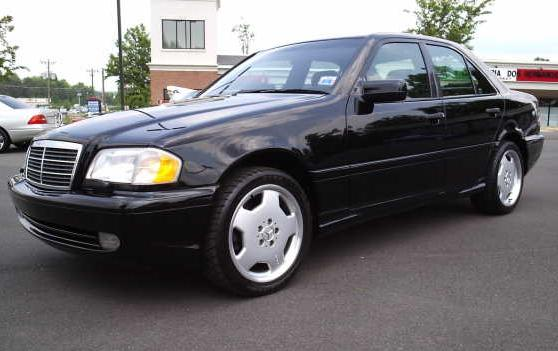 1999 Mercedes-Benz C43 AMG Photographed in Rochester, NY.